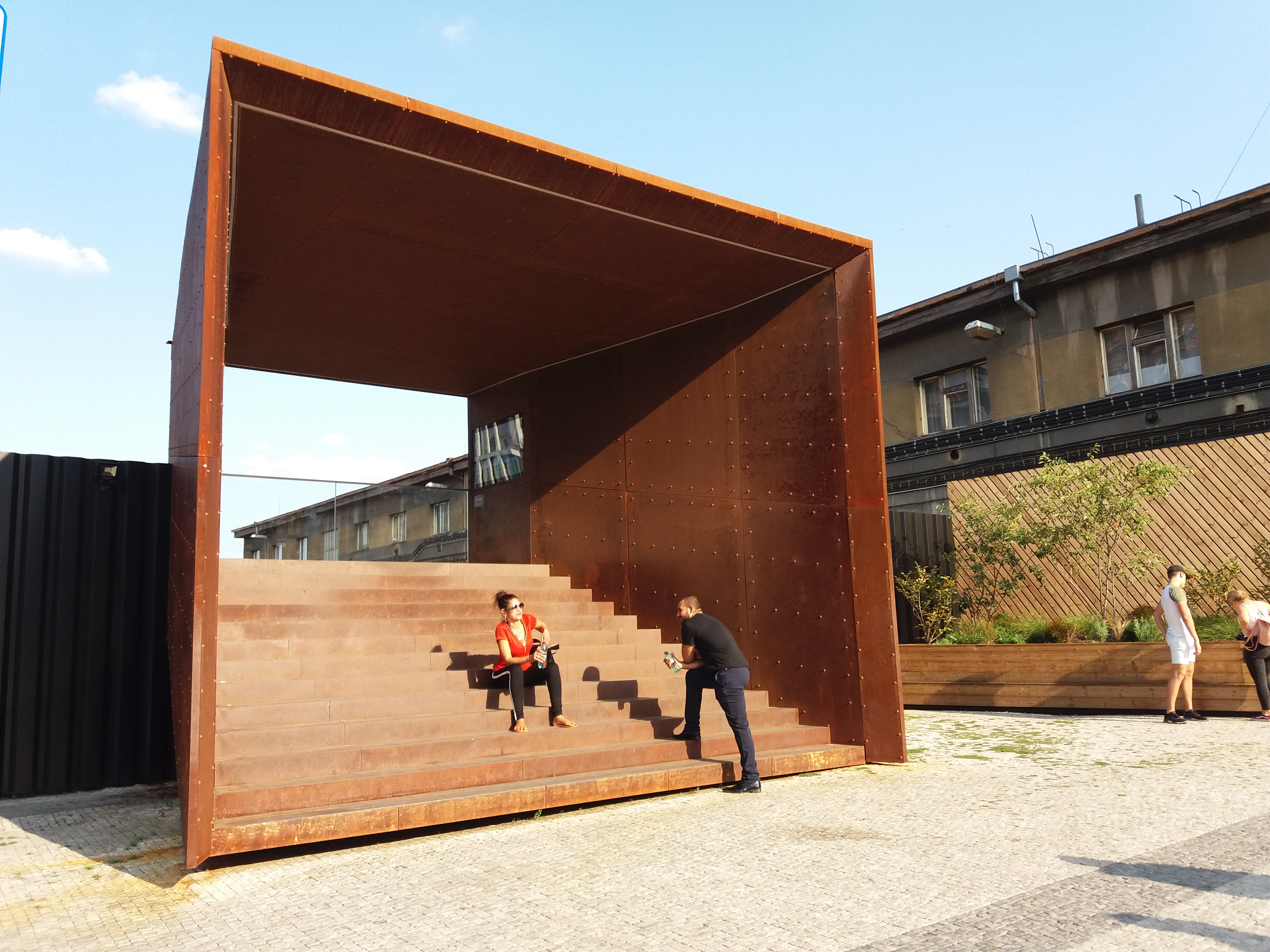 Vyhlídka do stavby v pražské ulici Na Florenci.